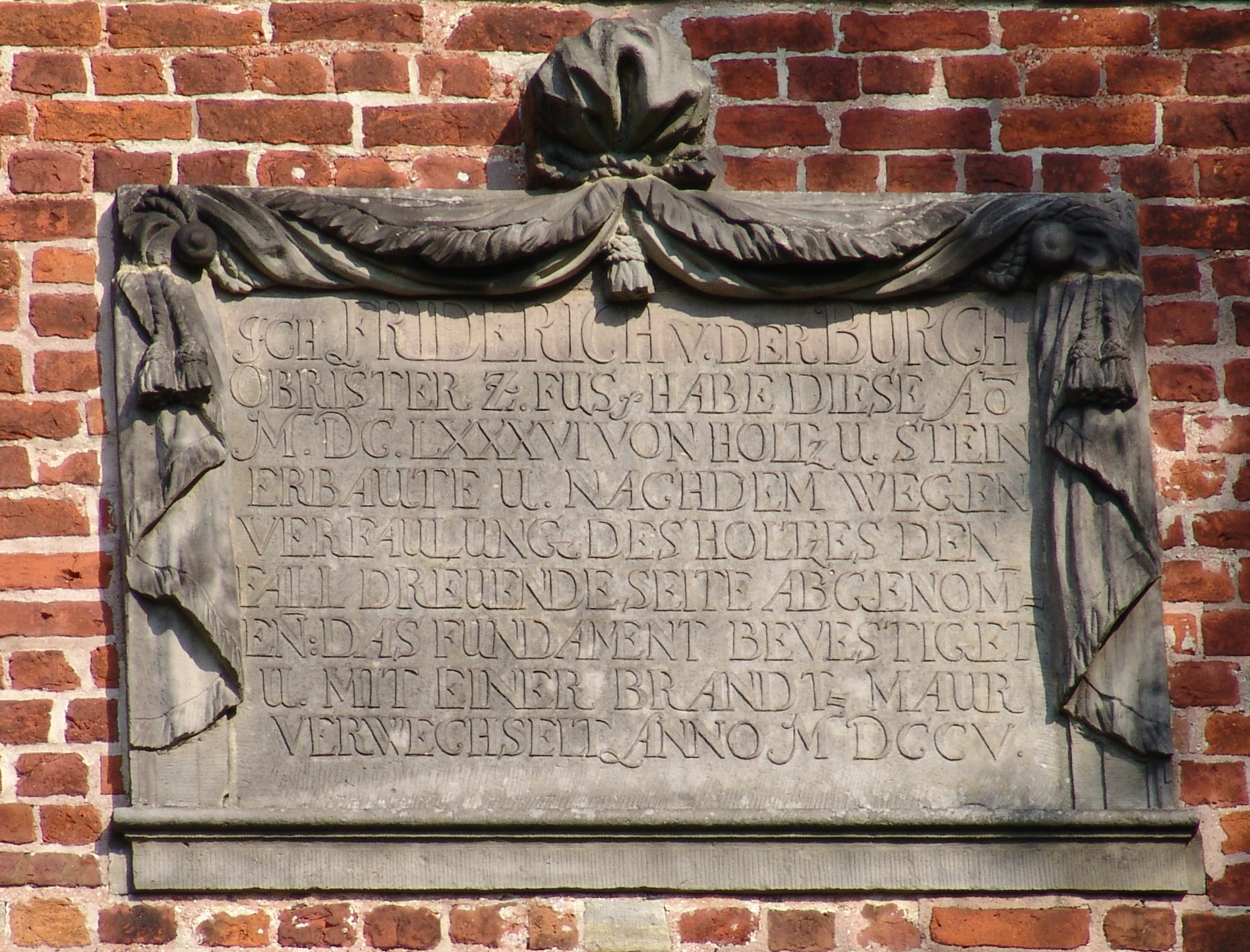 Schloss Schönebeck, Vegesacker Heimatmuseum in Bremen, Im Dorfe 5. Schrifttafel zur Erneuerung der Süswest-Fassade 1705.Das abgebildete Objekt ist ein geschütztes Kulturdenkmal in der Freien Hansestadt Bremen, mit der Nr. 1285 beim Landesamt für Denkmalpflege registriert.